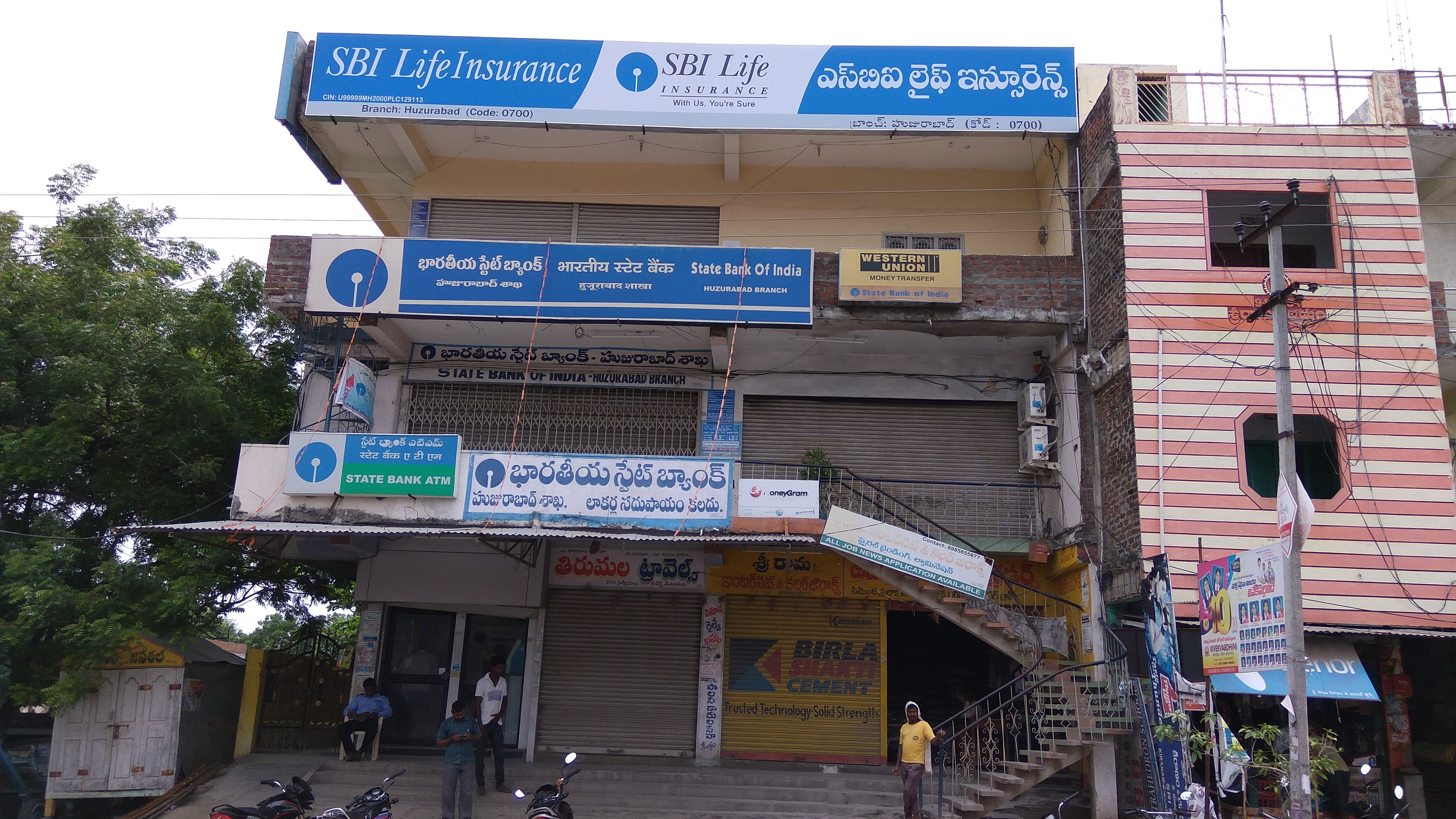 హుజురాబాద్ లోని ఎప్.బి.ఐ. బ్యాంక్